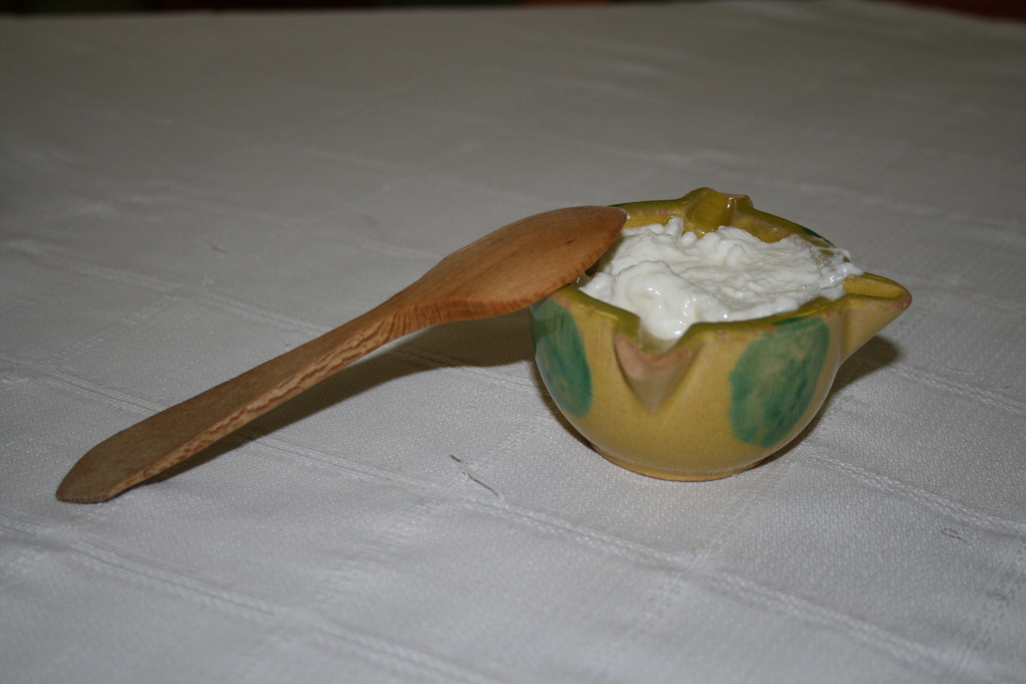 Salsa Alioli - Empleada como acompañamiento de una paella en los arrozales del Delta del Ebro